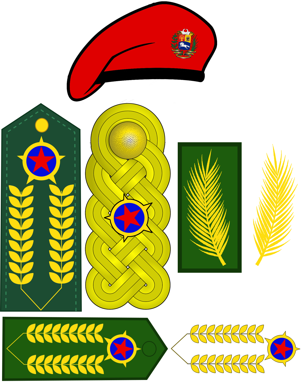 Distintos elementos que identifican al Comandante en jefe de la Fuerza Armada Nacional Bolivariana